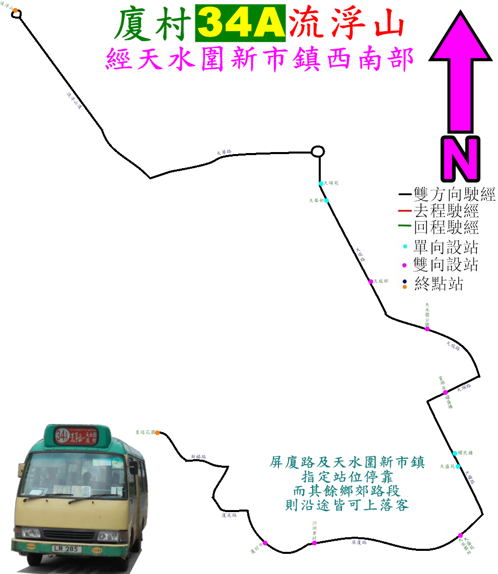 中文（香港）: 新界專線小巴34A線走線圖